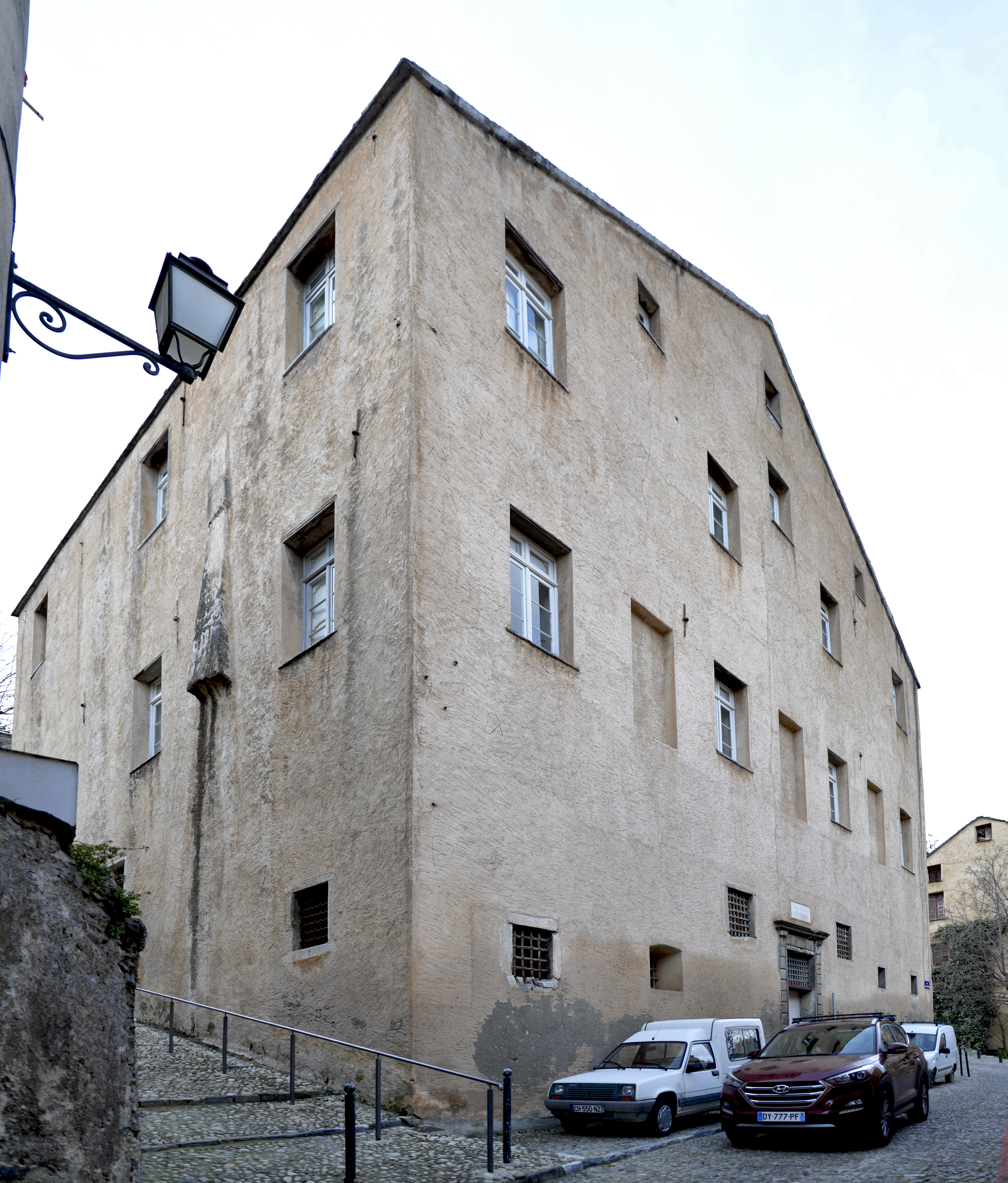 Corte, Centre Corse - U Palazzu, Maison dite Palais National, inscrite aux Monuments historiques